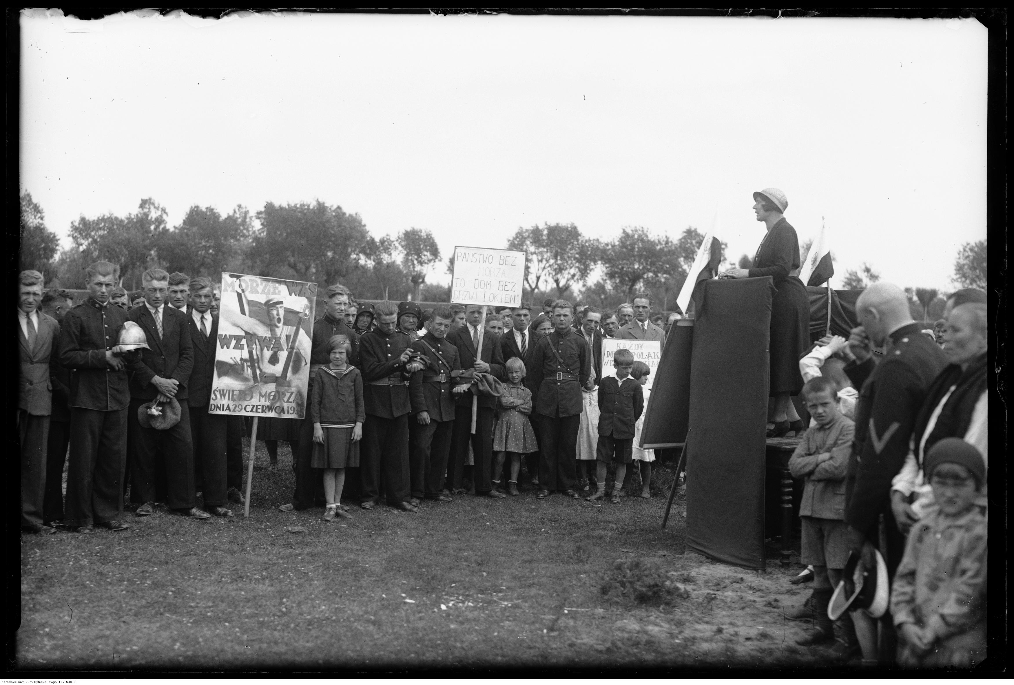 Fragment uroczystości - przemawia kobieta.